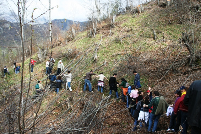 Туристы в Лахиче (Азербайджан)